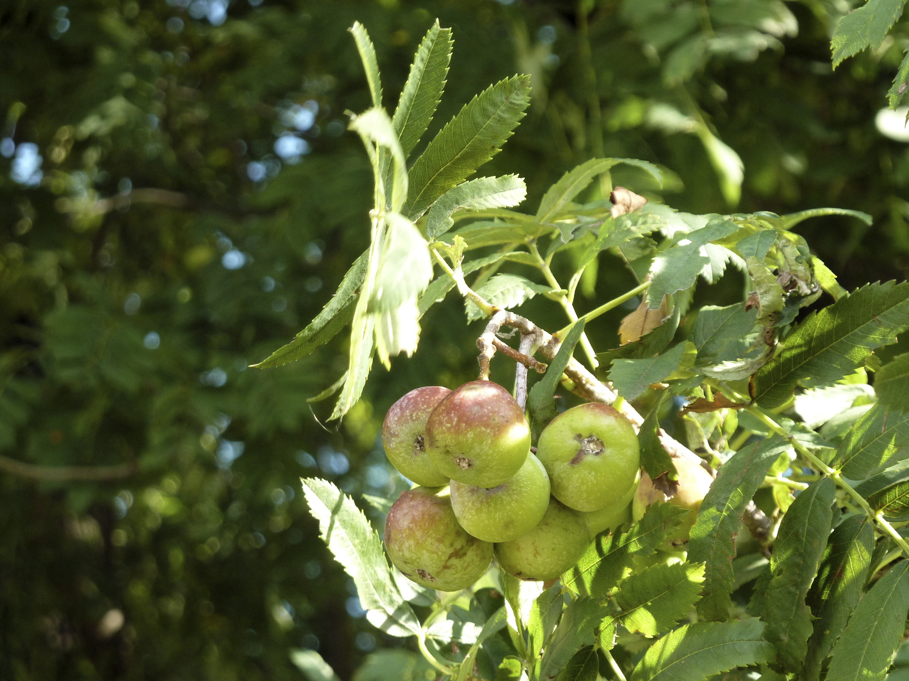 Frankfurt am Main, Stadtteil Sossenheim: Sossenheimer Unterfeld ist die Sammelbezeichnung für die landwirtschaftlich genutzten Felder und Wiesen zwischen dem südlichen Ortsrand Sossenheims und dem rechten Ufer des Flusses Nidda. Das Foto zeigt den Ast eines Speierlings (Sorbus domestica) mit Früchten